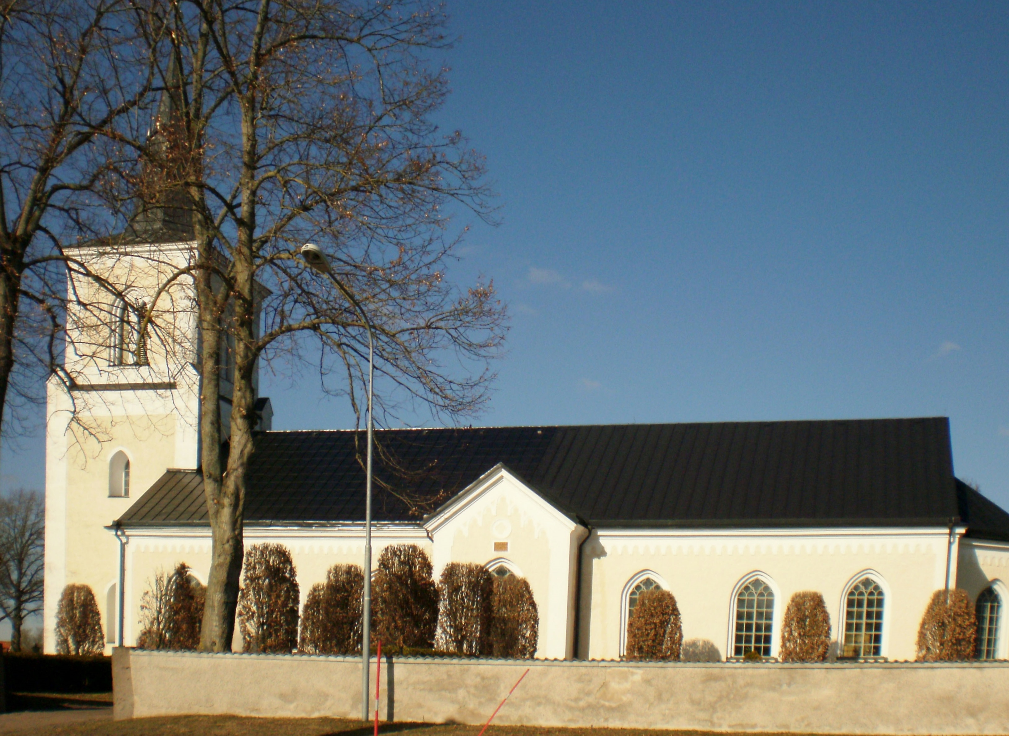 Förlösa kyrka